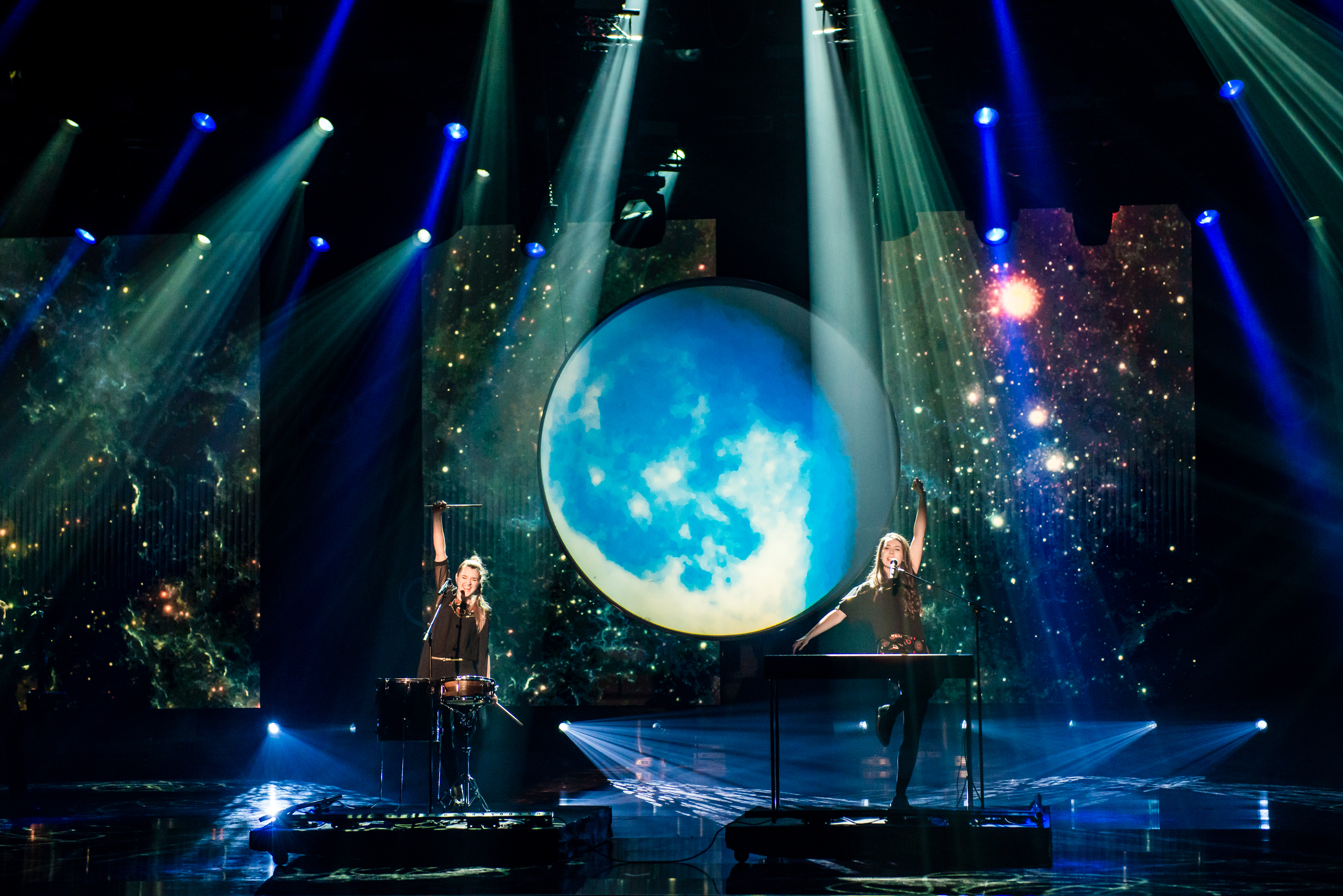 Eurovision Song Contest 2016 - Unser Lied für Stockholm - Joco